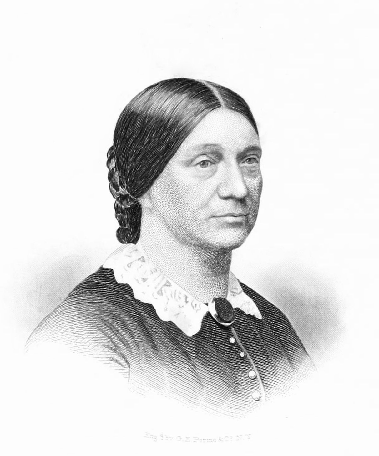 Jane Currie Blaikie Hoge